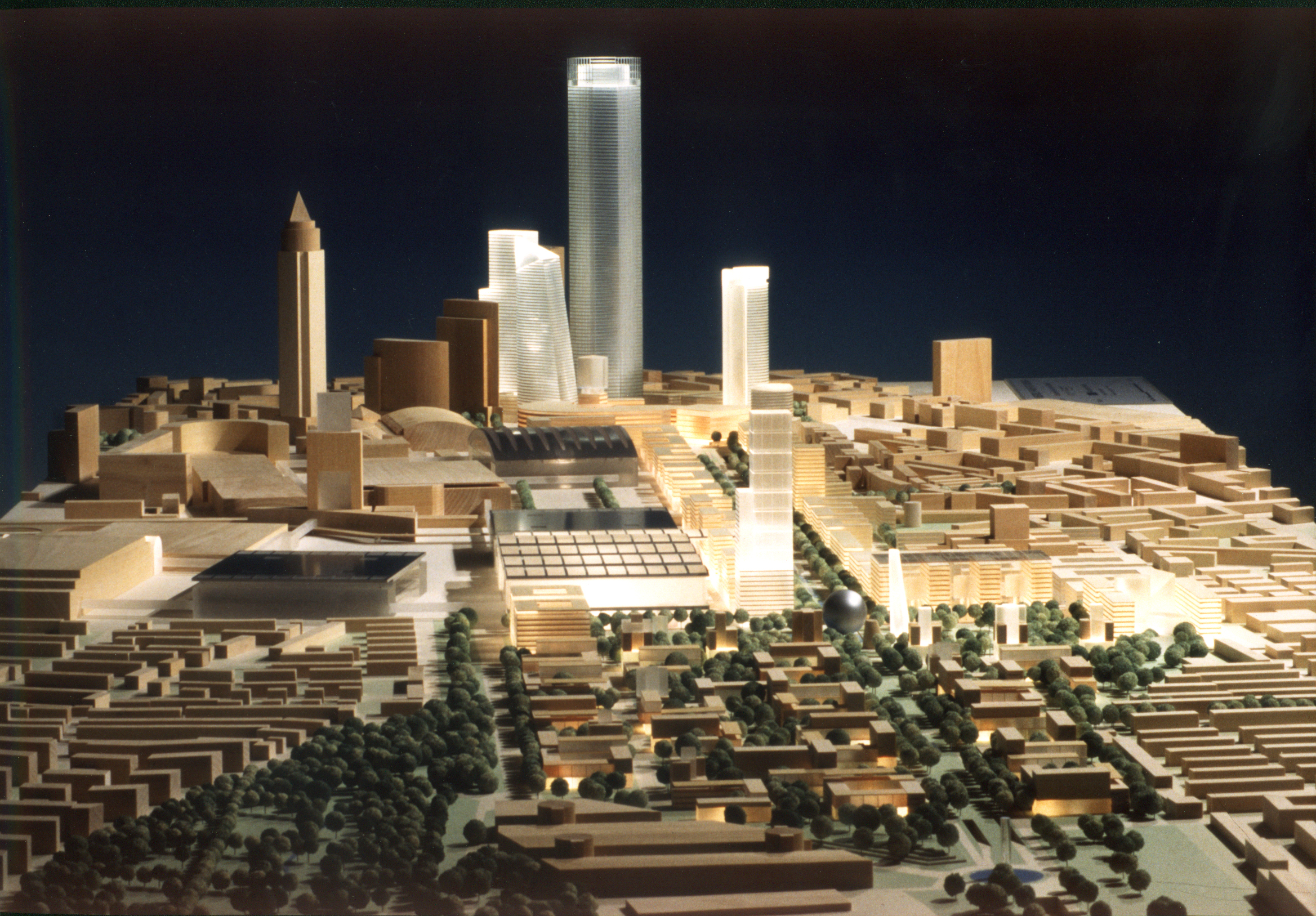 Modellfoto, Europaviertel, Frankfurt am Main